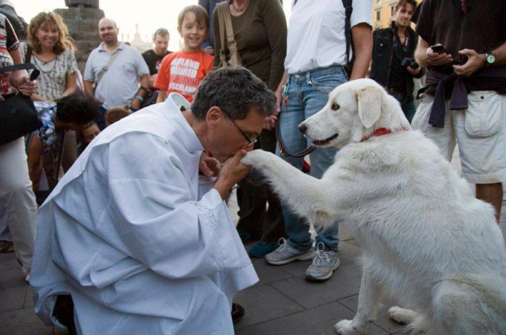 Tomasz Jaeschke (Tierschutzaktivist) bei einem Gottesdienst